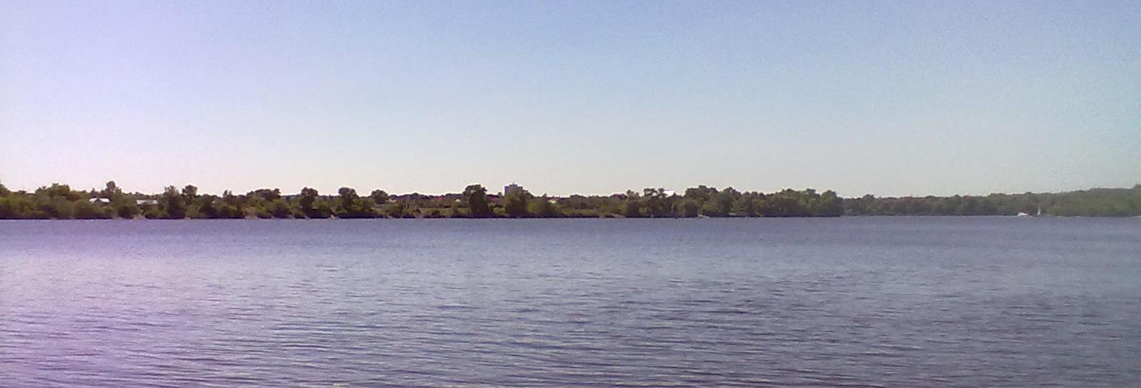 Северная оконечность острова Водников, вид с левого берега Днепра со стороны дачного поселка Нижние Сады-2.